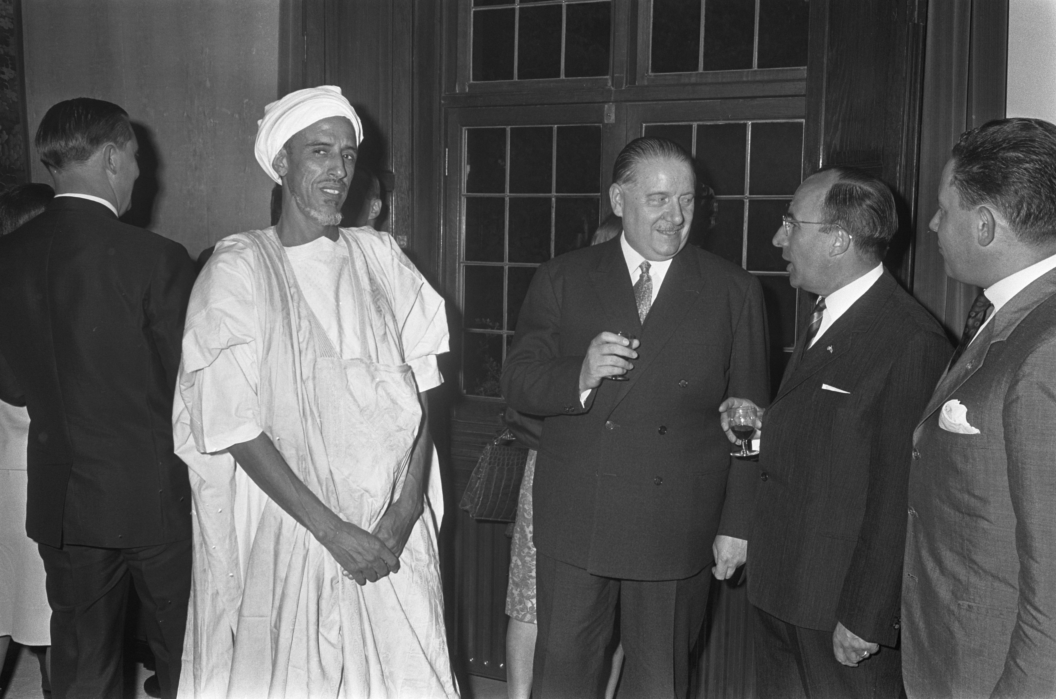 Collectie / Archief : Fotocollectie Anefo Reportage / Serie : [ onbekend ] Beschrijving : Receptie op Catshuis, Minister President Cals (rechts) gesprek met Alain Poher en Mohammed Fall Bavulea Datum : 24 mei 1966 Locatie : Den Haag, Zuid-Holland Trefwoorden : recepties Persoonsnaam : Alain Poher, Cals, Jo, Mohammed Fall Bavulea Fotograaf : Koch, Eric / Anefo Auteursrechthebbende : Nationaal Archief Materiaalsoort : Negatief (zwart/wit) Nummer archiefinventaris : bekijk toegang 2.24.01.05 Bestanddeelnummer : 919-1891